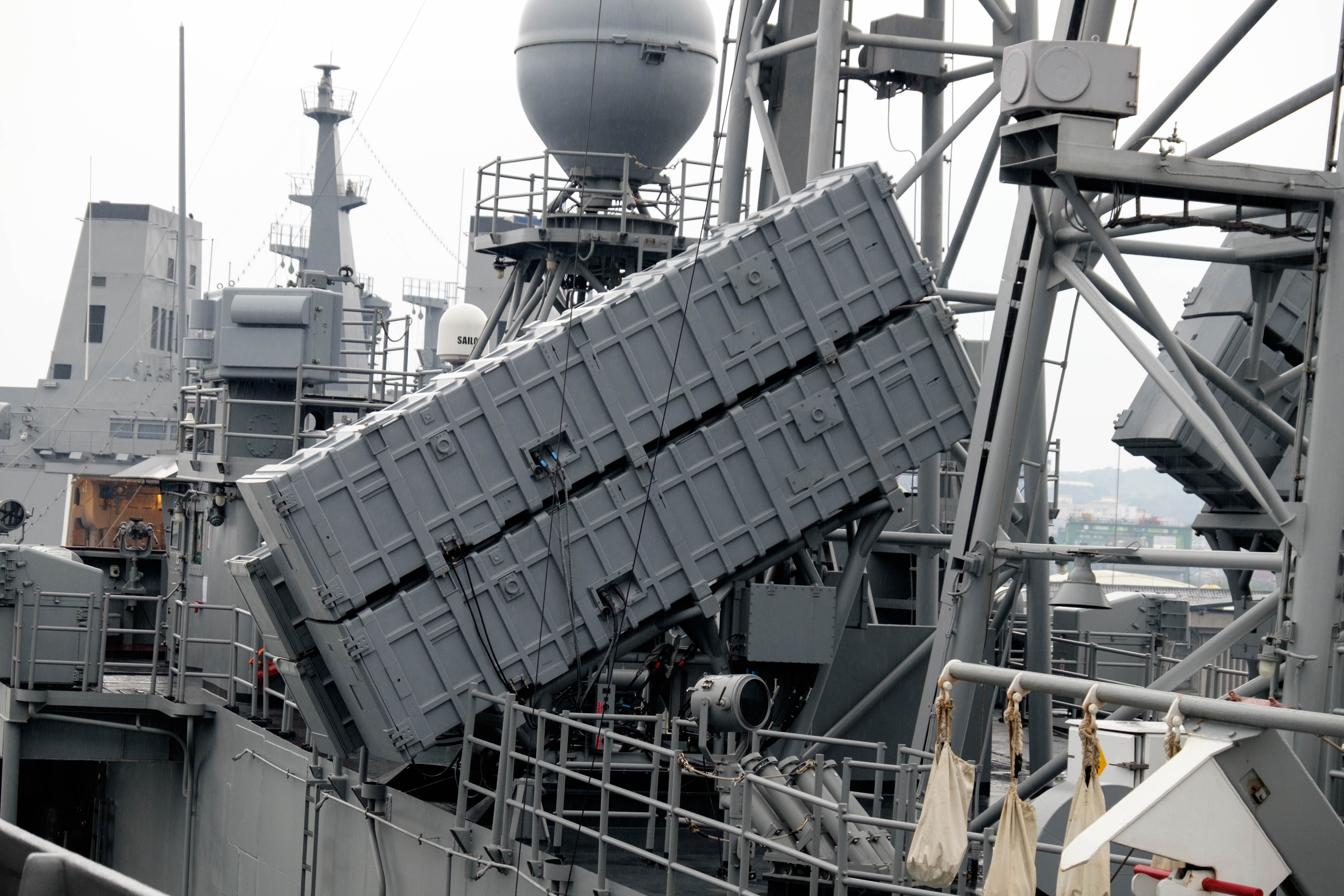 飛彈巡防艦張騫（PFG2-1109）上甲板中部左側的雄風二型與三型反艦飛彈發射器。